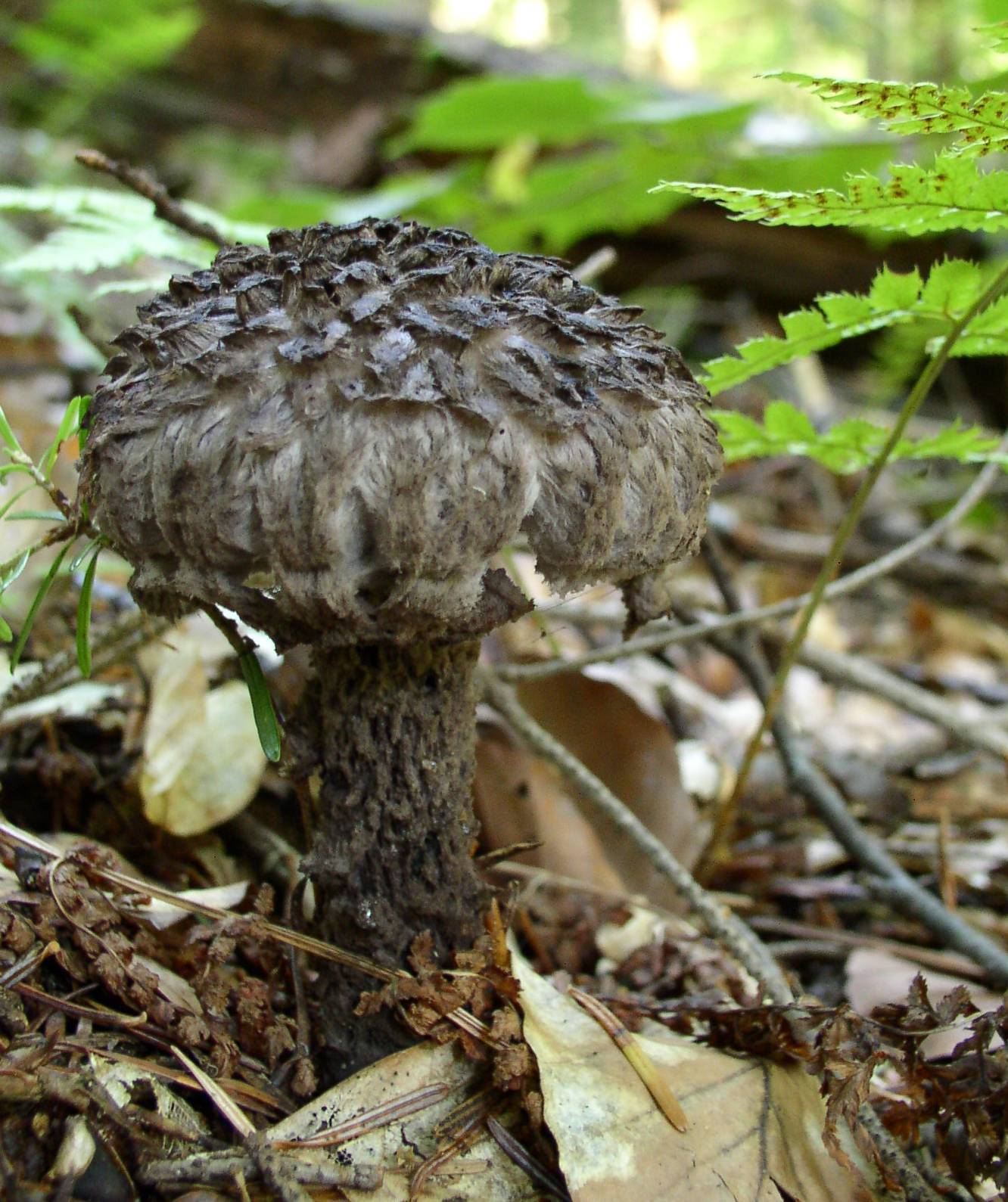 Strobilomyces strobilaceus, Synonym: Strobilomyces floccopus, Wykonane w okolicach Krecowa. 30 sierpnia 2005 r.